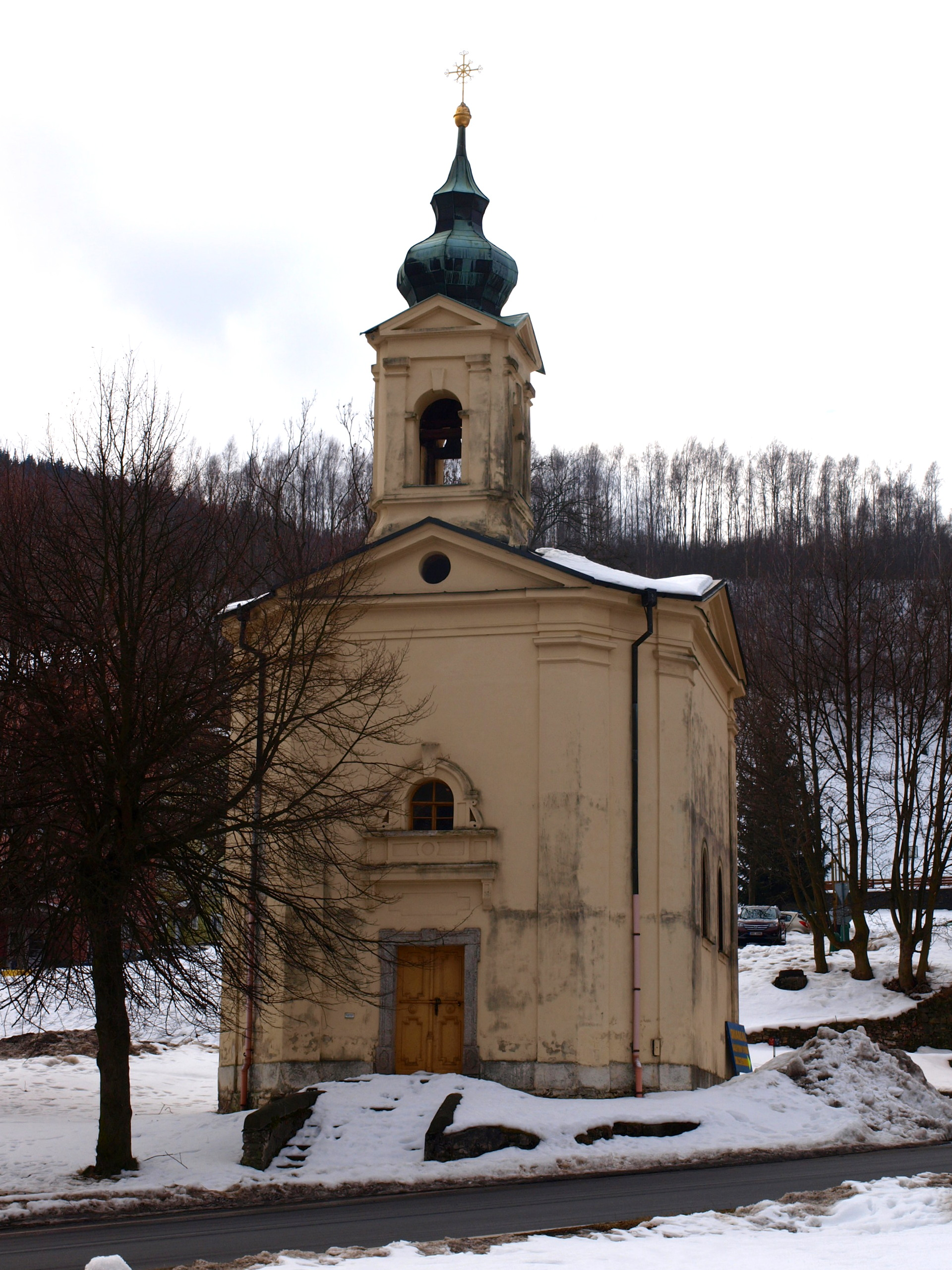 Jáchymov